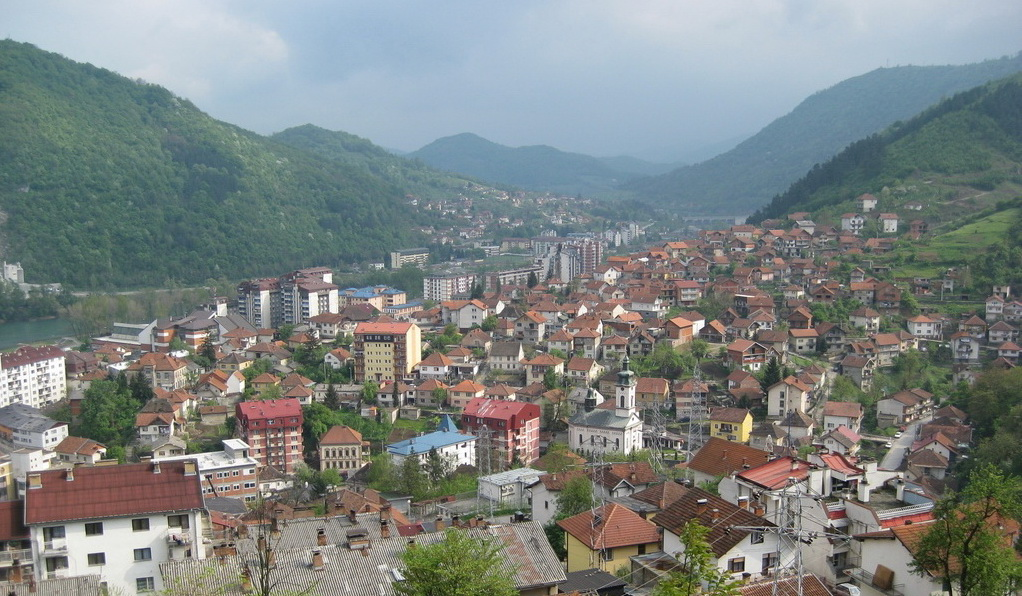 Hram Sv. Jovana Krstitelja, Zvornik